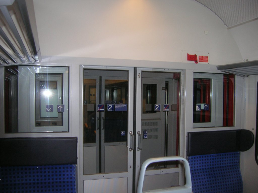 „lazarettfähiger“ Bn-Wagen mit breiter Eingangsbereichstür